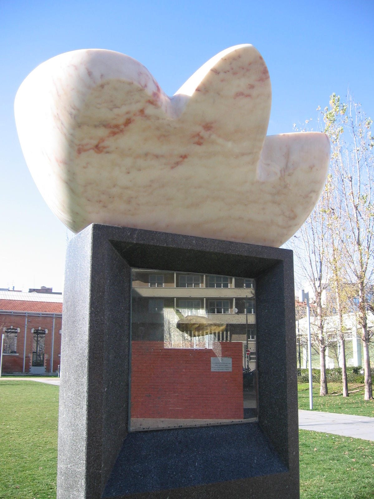 Monumento em Lisboa a :Jorge Luis Borges, escritor argentino realizado por el escultor Federico Brook (Buenos Aires, 1933) amigo de Borges.